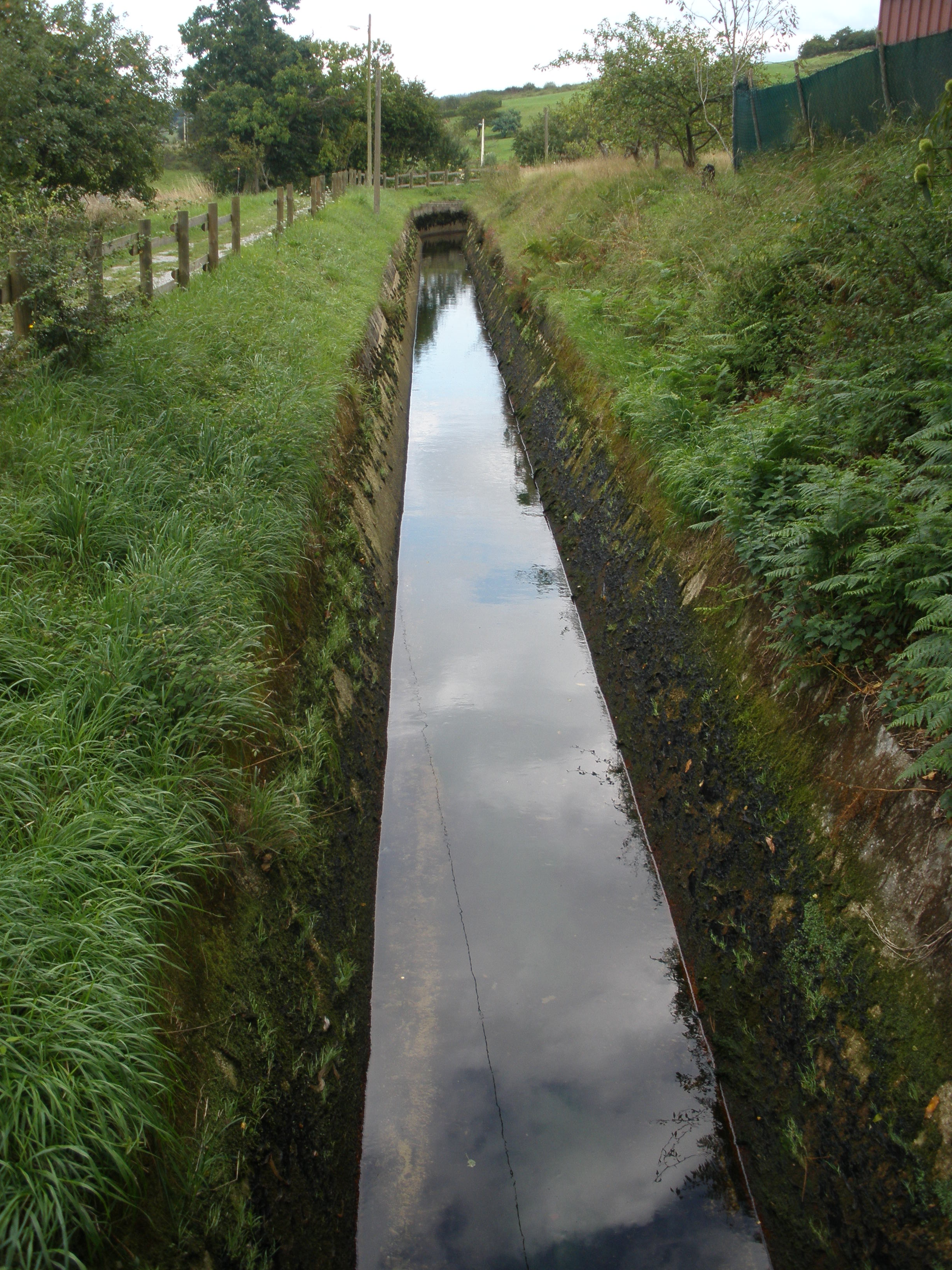 Vista de un tramo del Canal del Narcea en Pillarno, Castrillón.